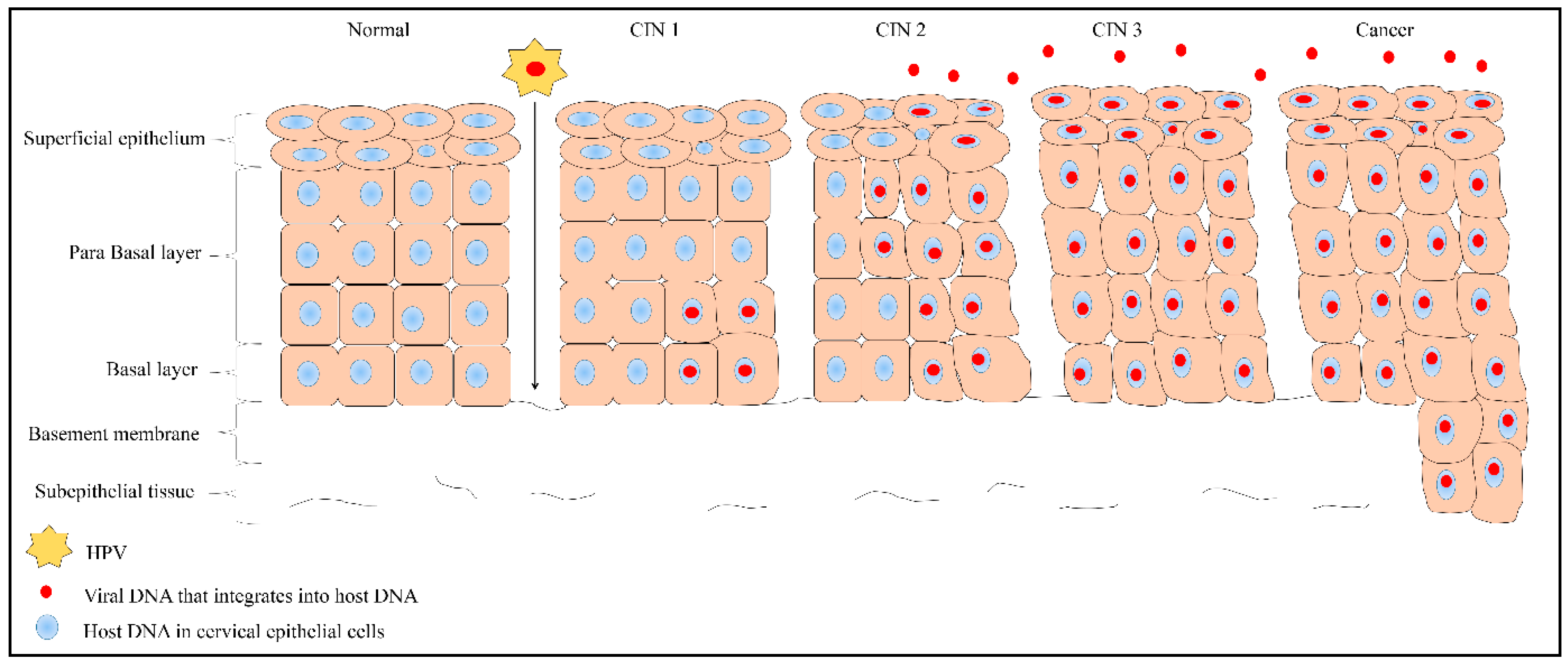 Distribution de l'HPV dans l’épithélium malpighien cervicale et le rapport avec les différents types de lésion cervicale